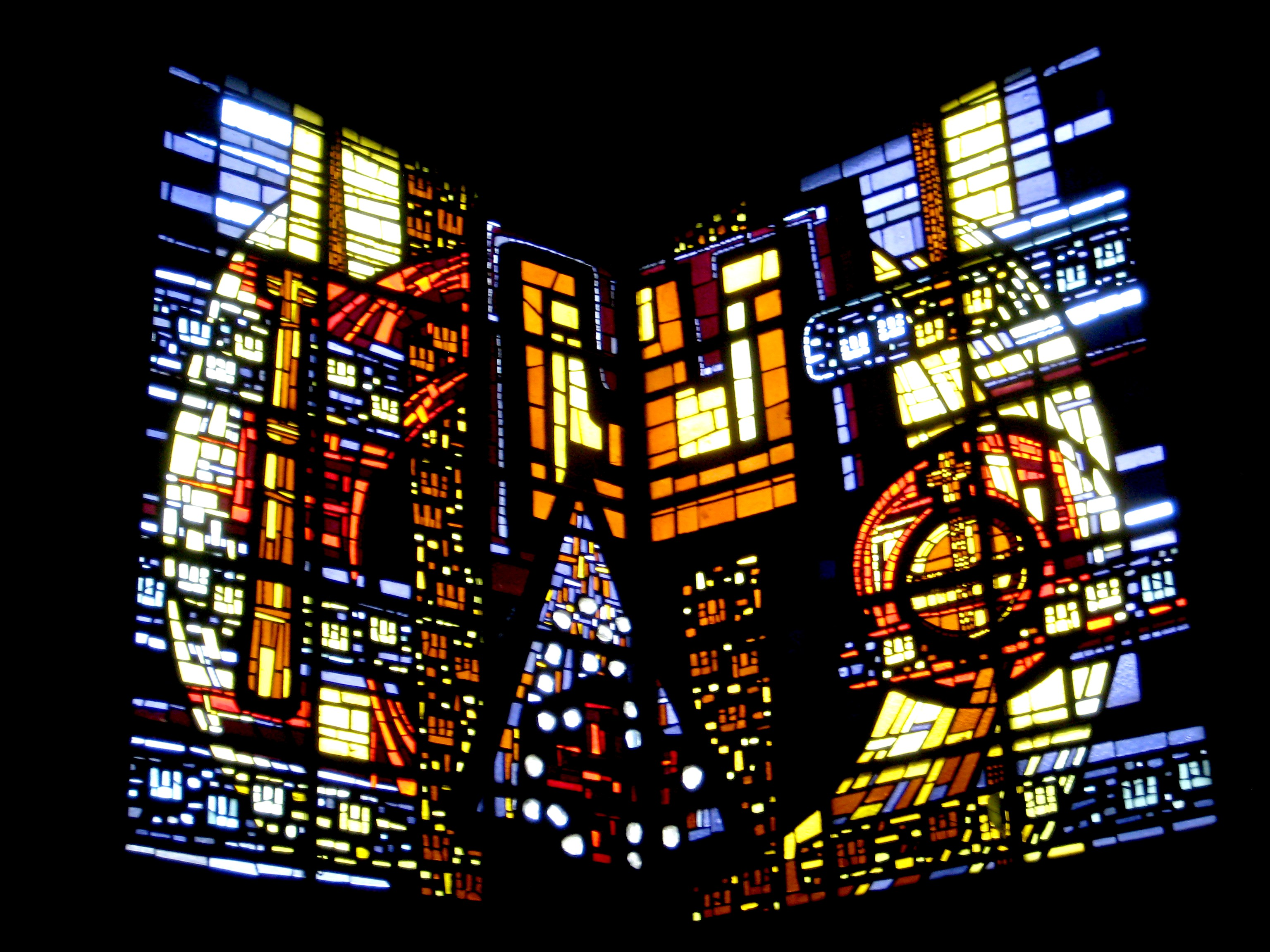 Krönungskirche Maria Königin, Liebfrauenhöhe, Fenster über dem Eingangsportal greift das Thema der Kirche auf als